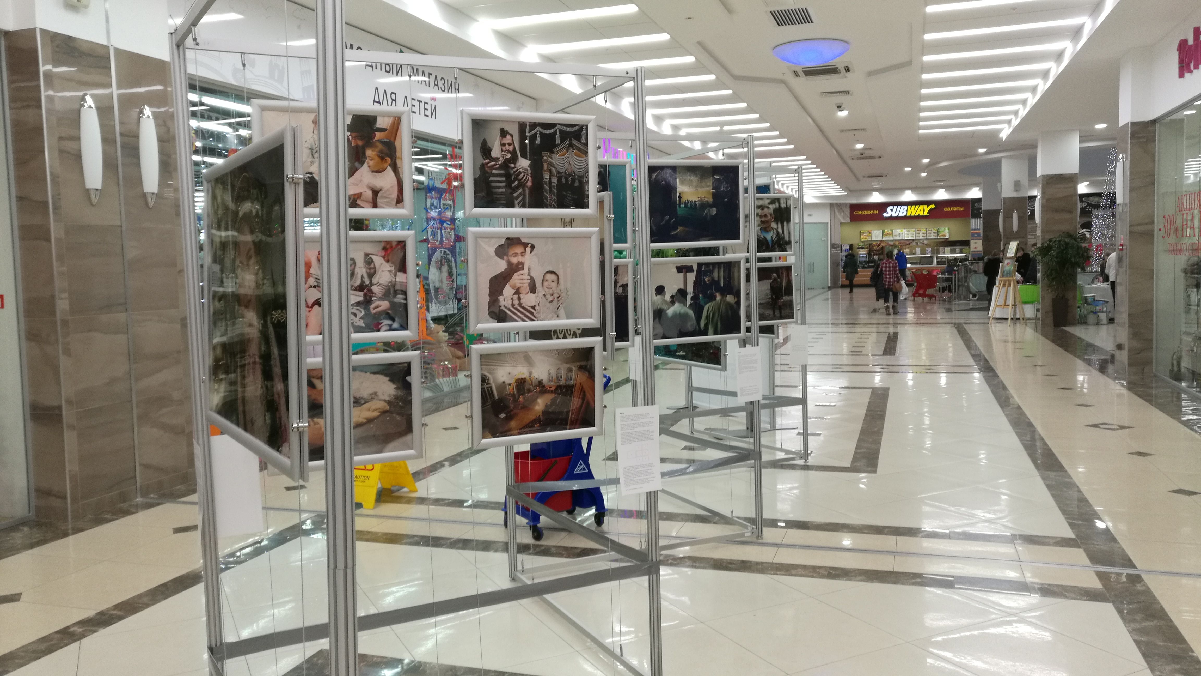 Fotoekspozicio "Siberianoj" en aĉetcentro Voyage. Tjumeno, Rusio.